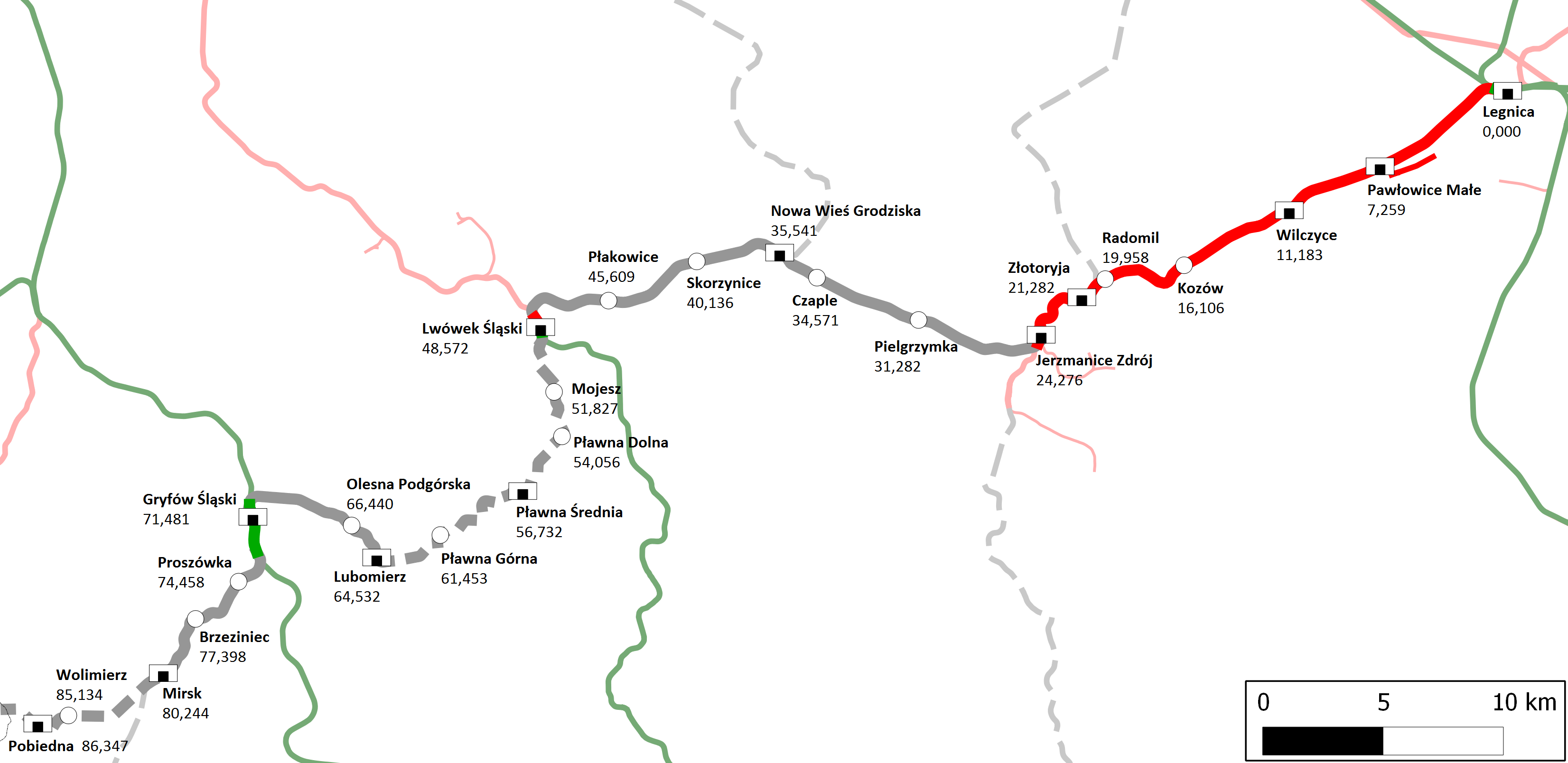 Mapa przedstawiająca linię kolejową nr 284 w pierwotnym jej przebiegu.